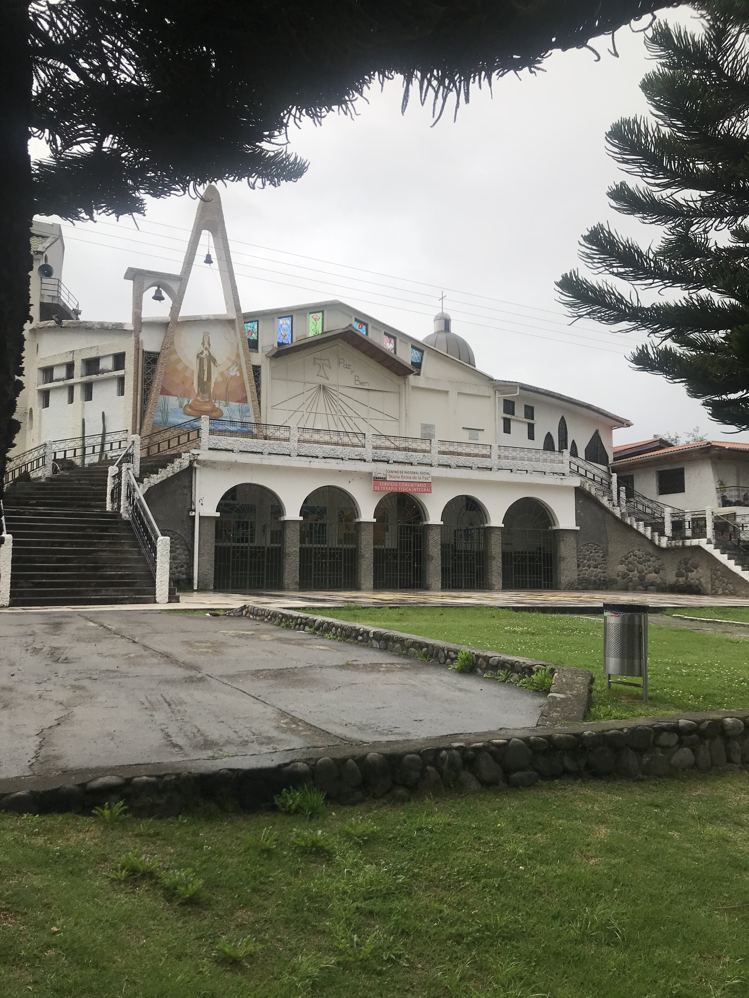 Iglesia Catolica Maria Reina de la Paz